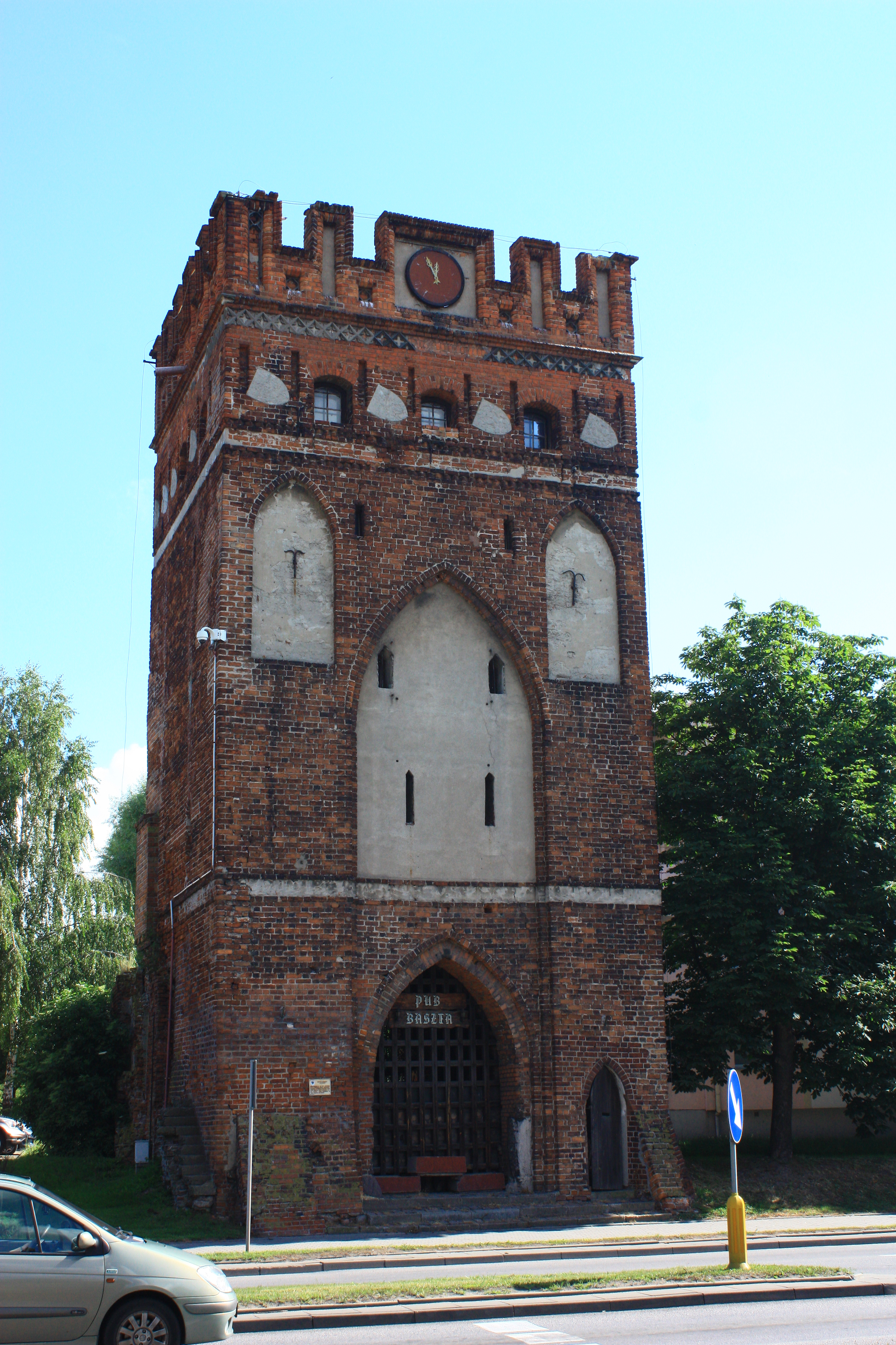 Malbork, Brama Mariacka (Przewozowa, Sztumska), 2 poł. XIV